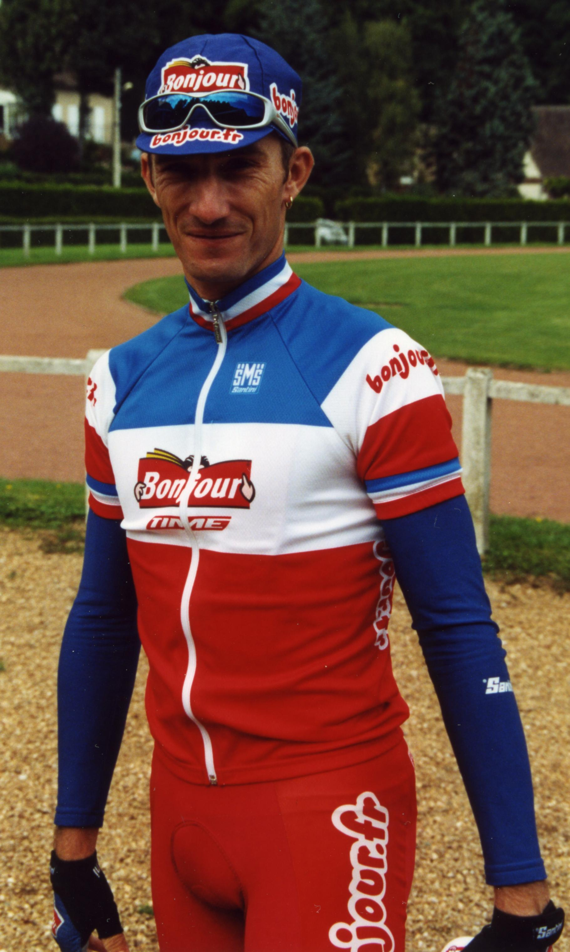 AU CRITERIUM DE LEVES 2001